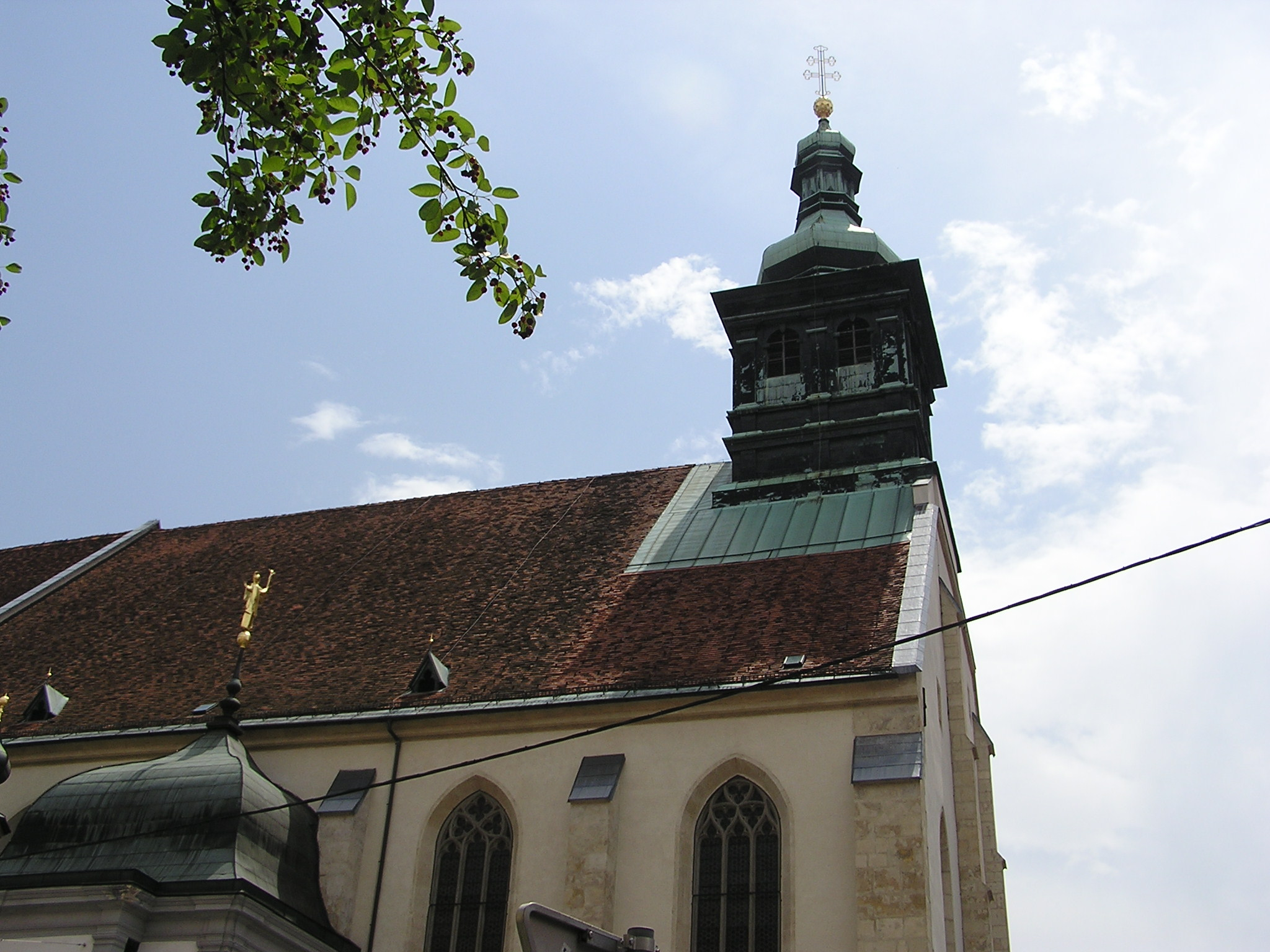 Domkirche St. Ägydius in Graz